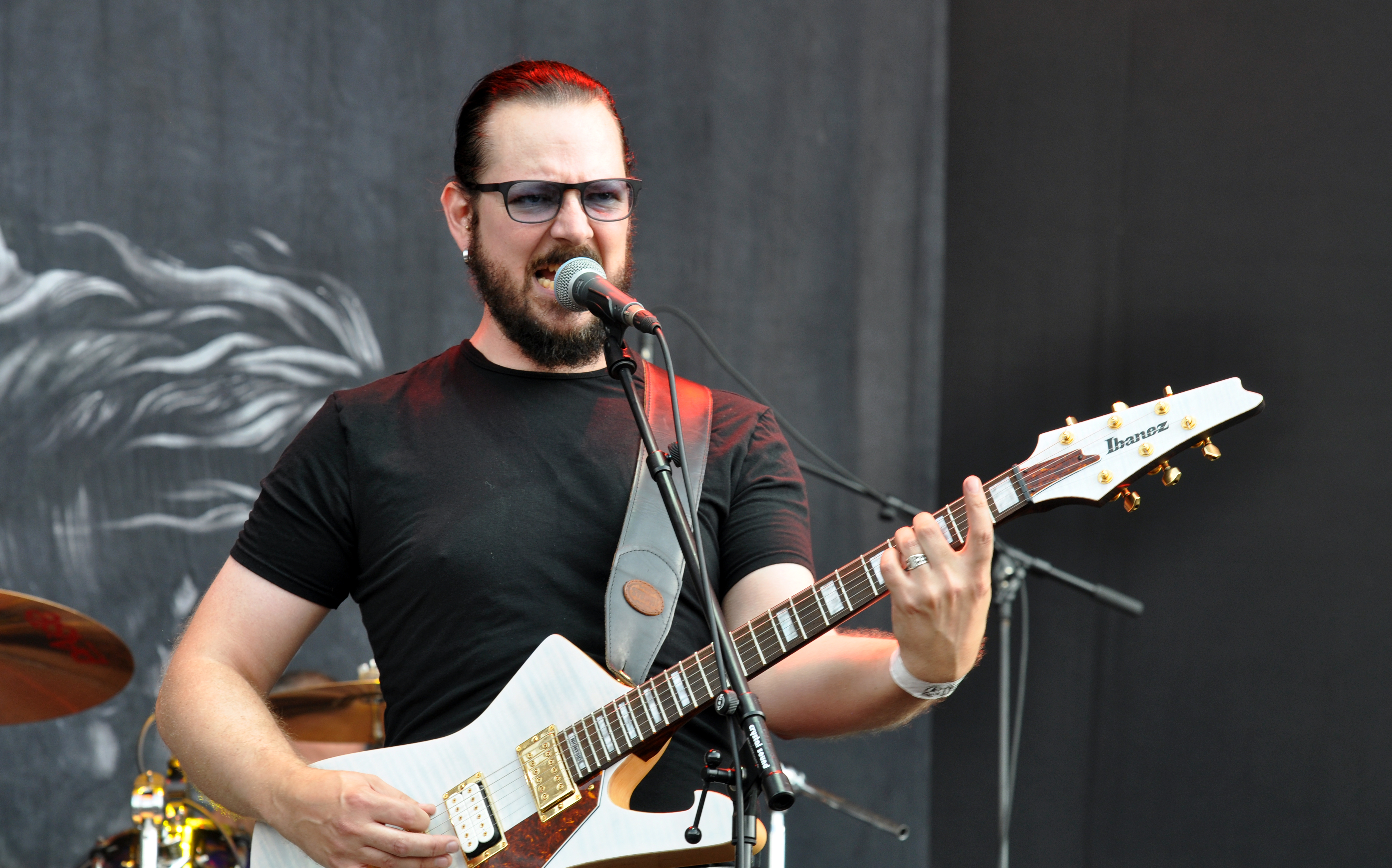 02-08-2014-Vegard „Ihsahn“ Tveitan with Emperor at Wacken Open Air 2014-JonasR 04